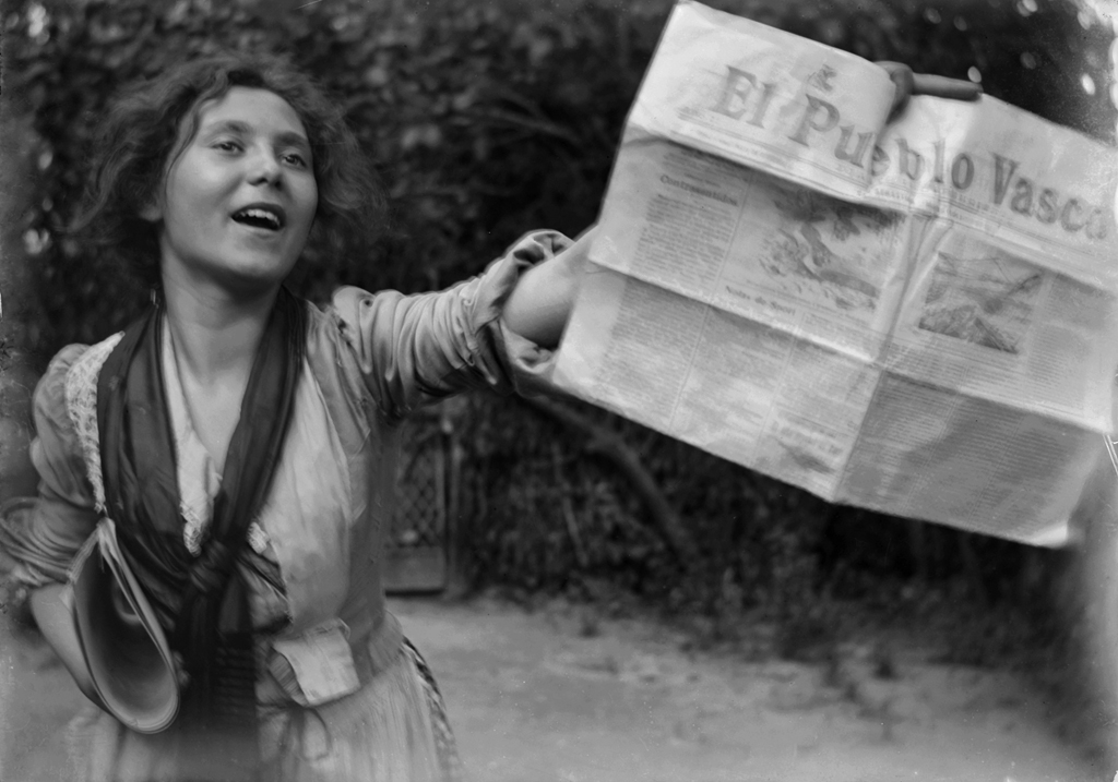 Baldomer Gili Roig. "Model (Cartell El Pueblo Vasco)", 1900 – 1904. Còpia moderna del negatiu original de vidre. 20 x 25 cm. Llegat Dolors Moros, 2010. Museu d'Art Jaume Morera, Lleida.